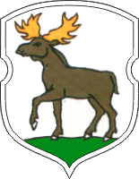 Herb Horodna